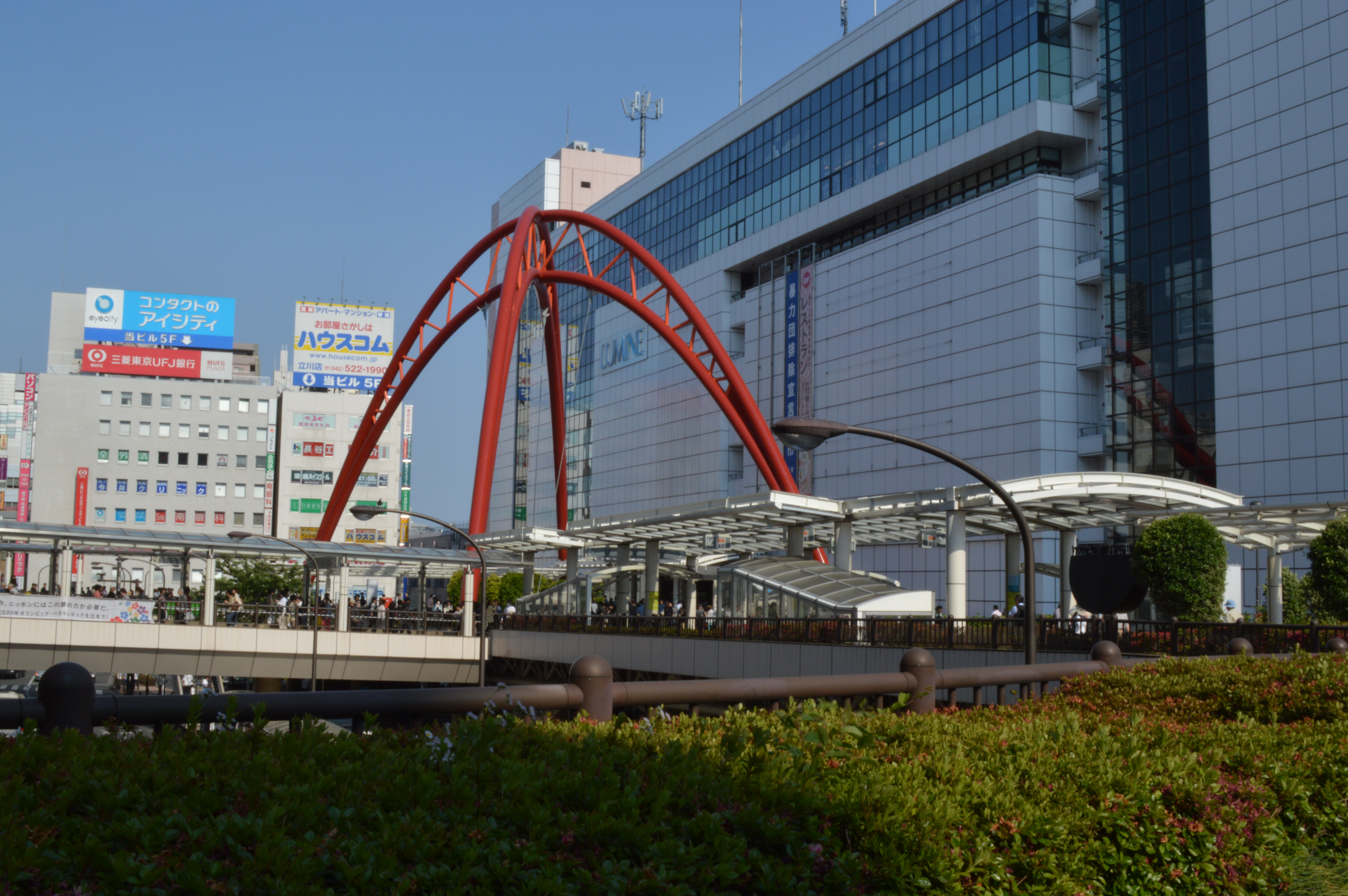 どこかで見た立川駅北口